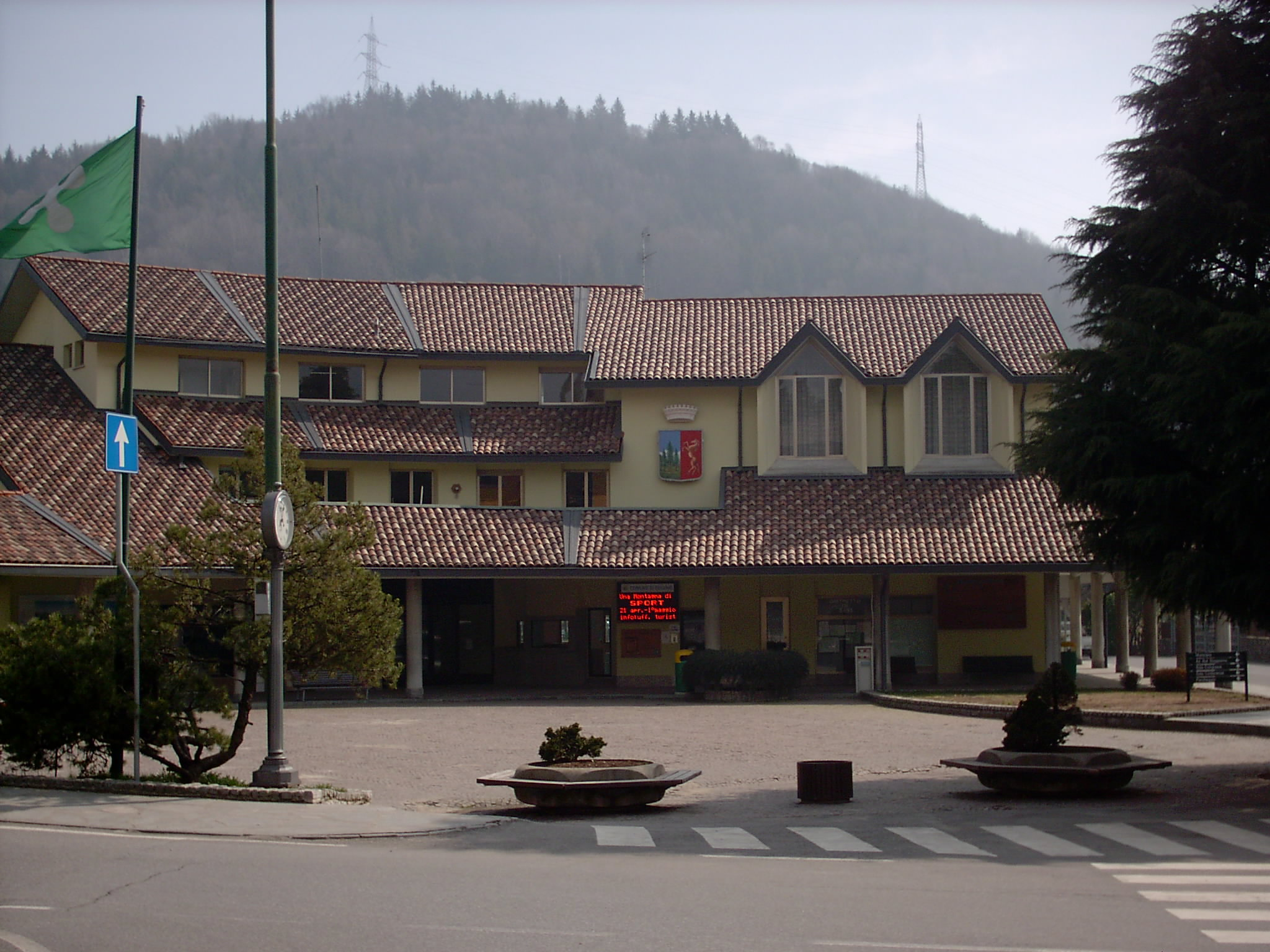 Selvino, Bergamo, Italia